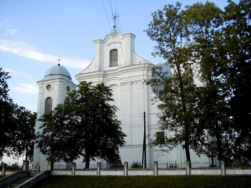 Dagdas katoļu baznīca 2000-07-22